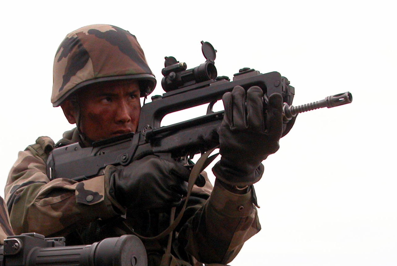 Tireurs Minimi et Famas du 2e Régiment étranger d'infanterie (France)